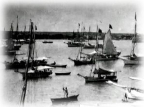 Piraguas en el Lago de Maracaibo, Venezuela, a finales del siglo XIX.